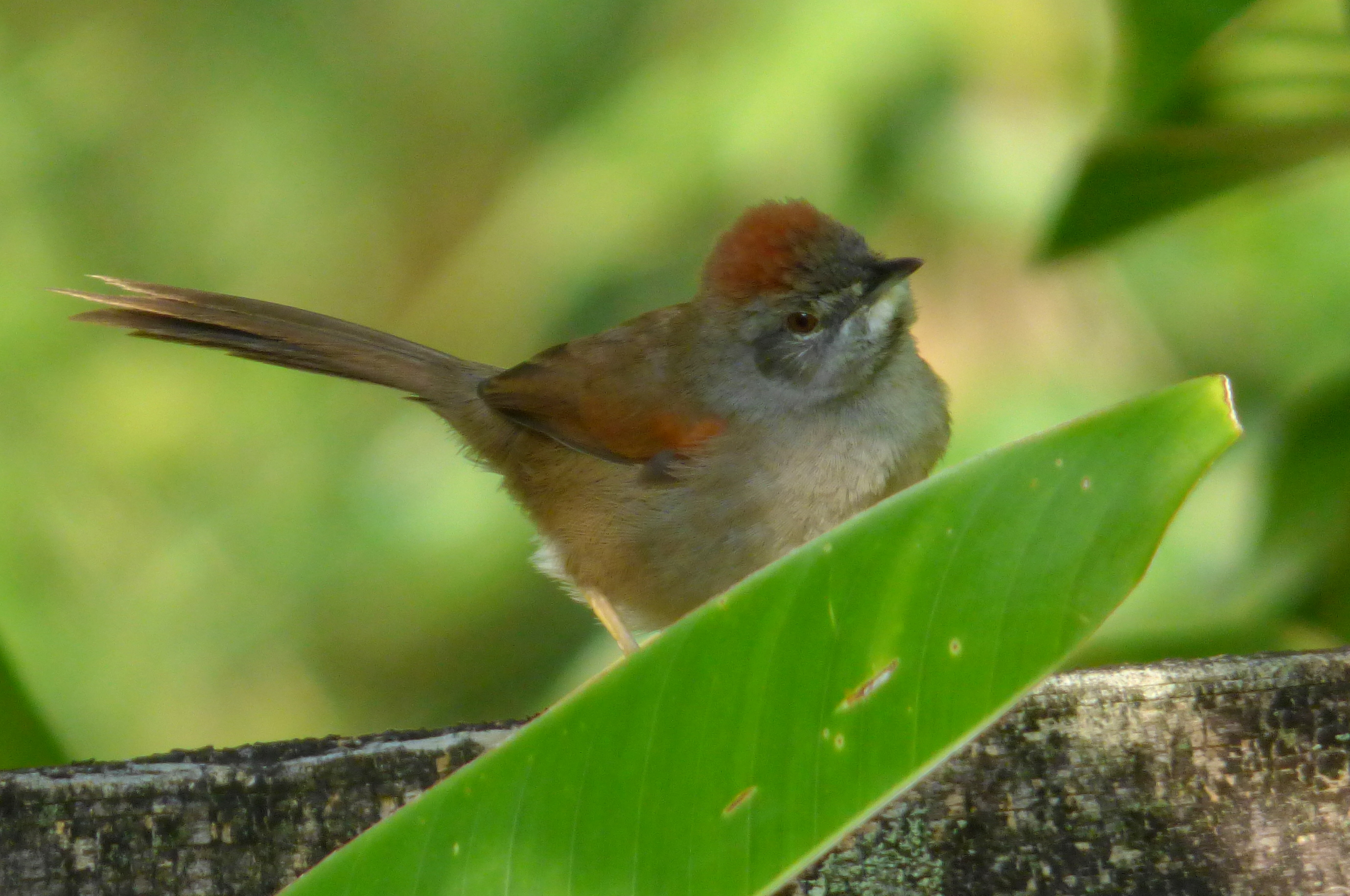 Synallaxis albescens (Rastrojero pálido)